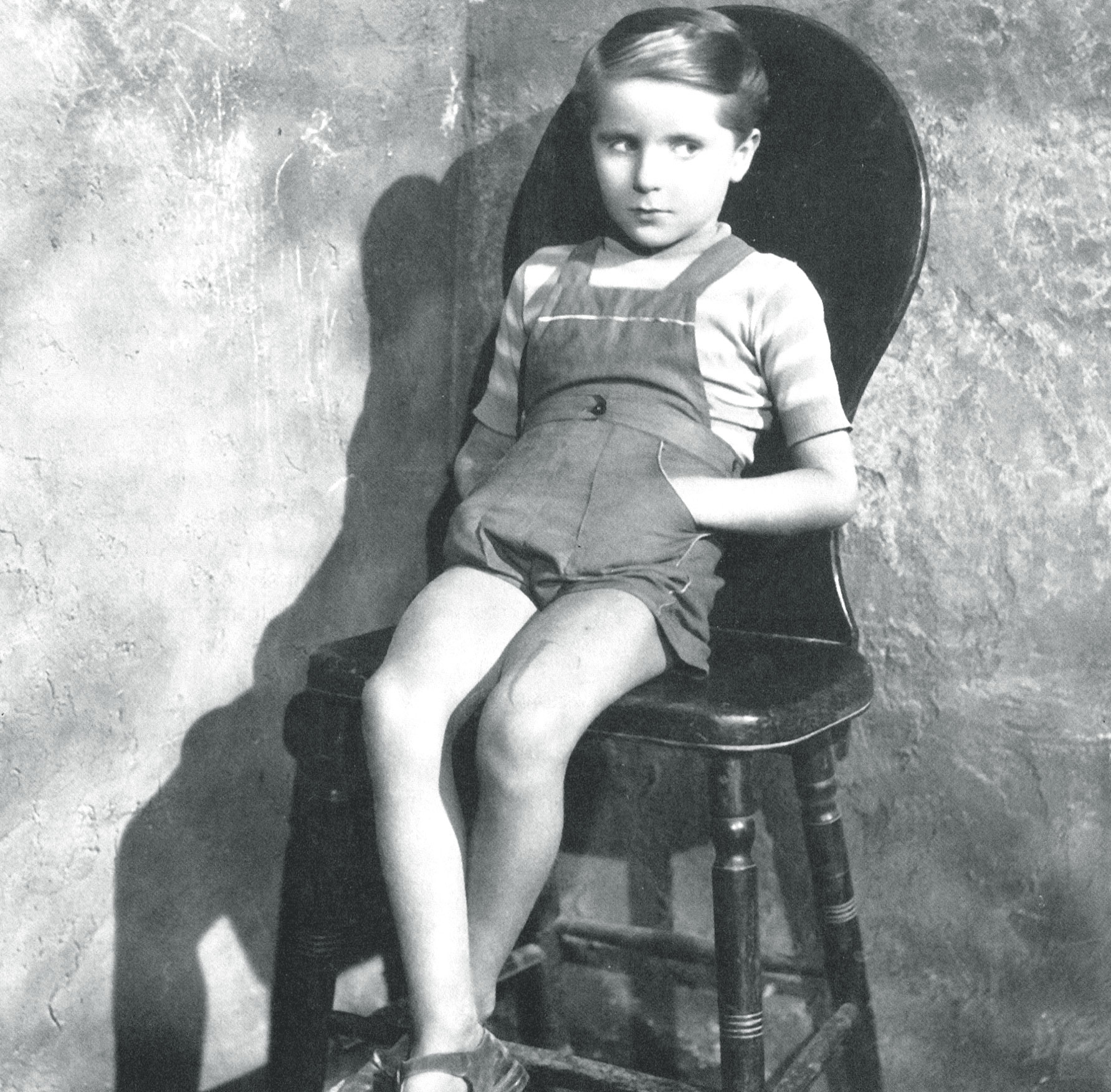 Luciano De Ambrosis de "I bambini ci guardano" (De Sica, 1943)